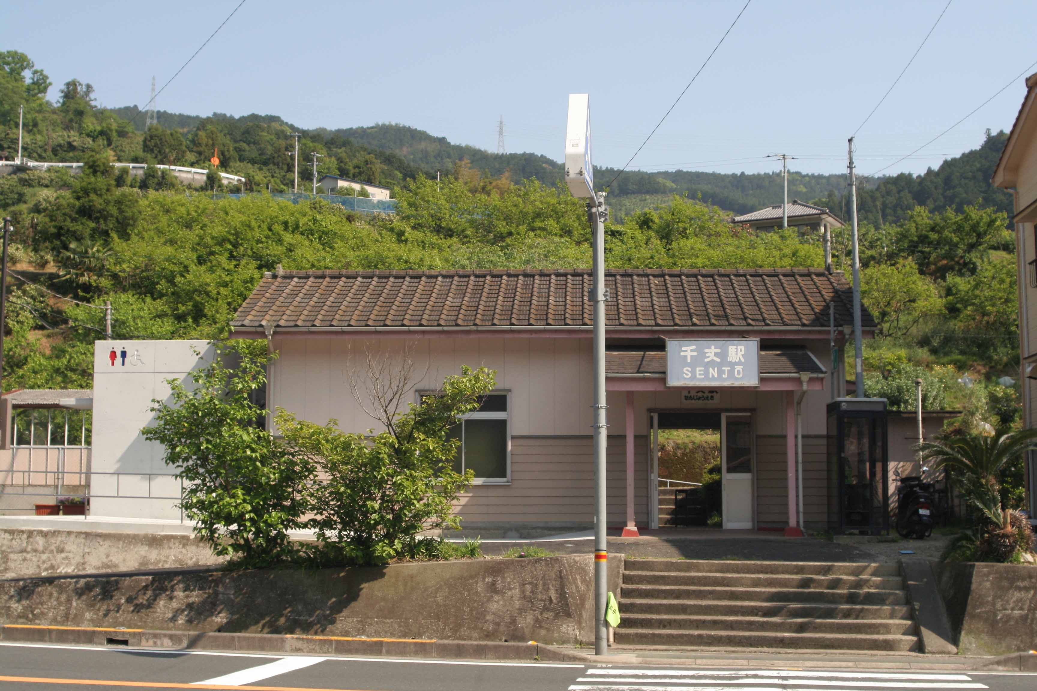 千丈駅の駅舎